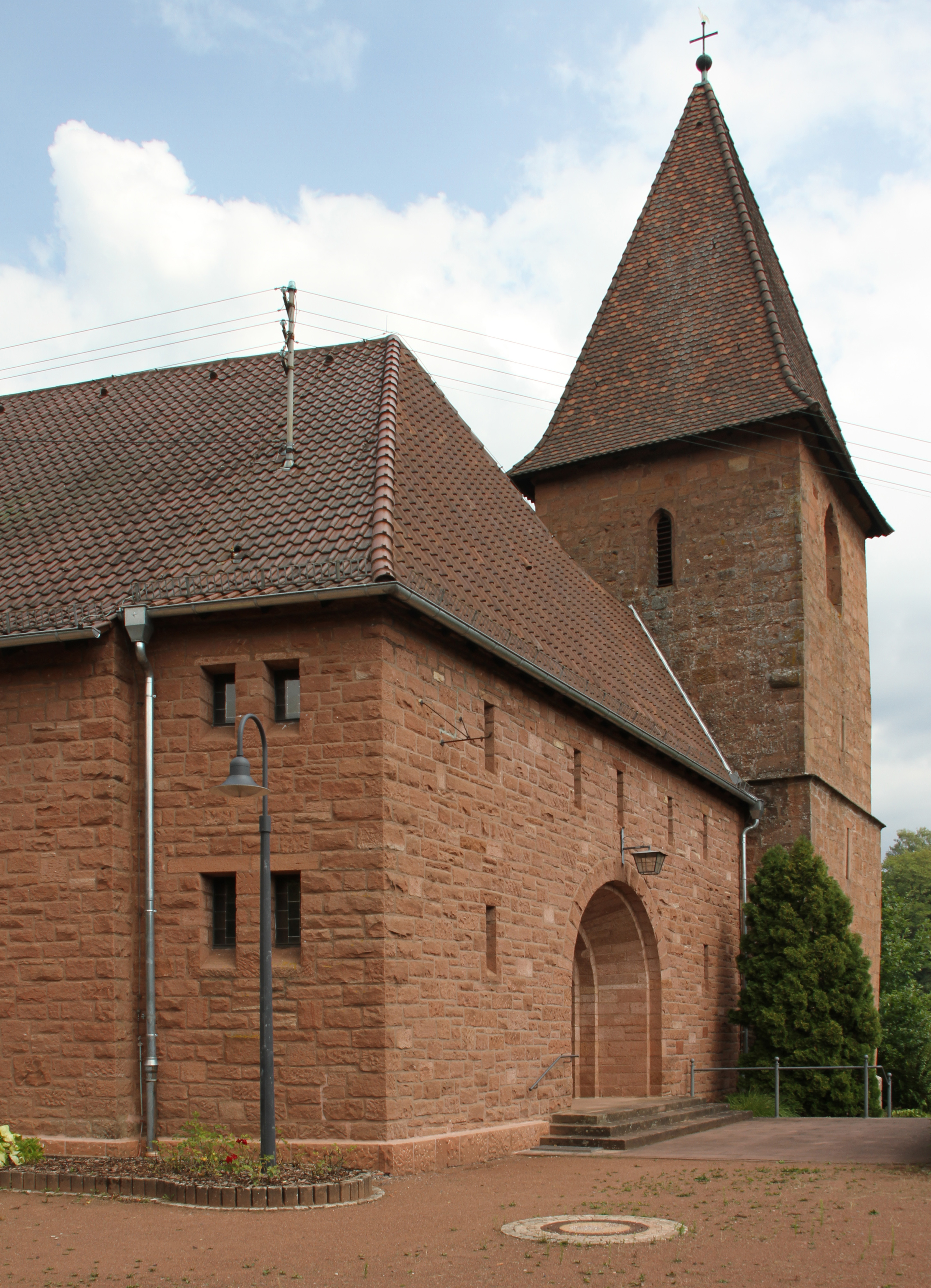 Niederschlettenbach, katholische Pfarrkirche St. Laurentius, Kirchstraße 10; Chor um 1220, Turm aus dem 15. Jahrhundert, einbezogen in den Neubau von 1952; barocker Kreuzsockel, bezeichnet 1783.